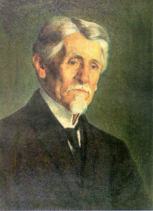 Сима Лозанић, дело Уроша Предића